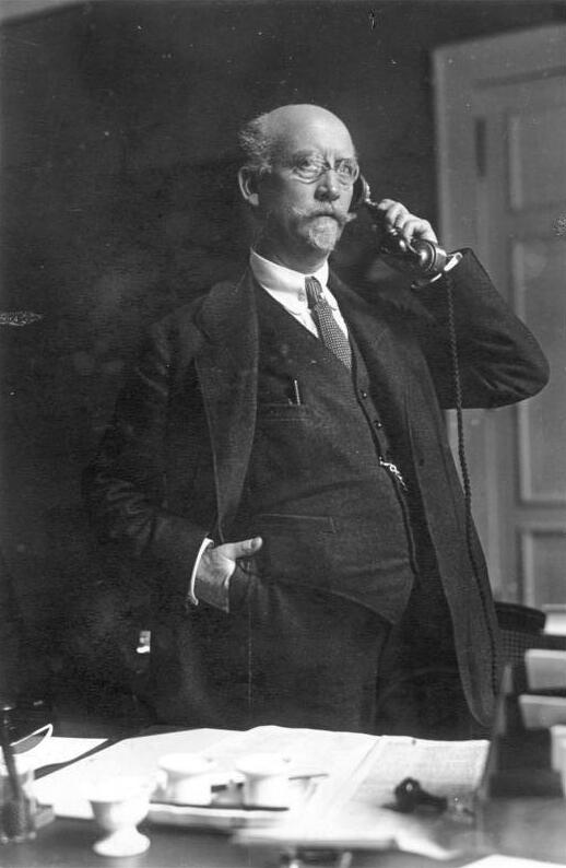 Staatssekretär Exzellenz Phillip Scheidemann in seinem Arbeitszimmer im Reichsamt des Innern Aufn.: Ende Sept./Okt. 1918